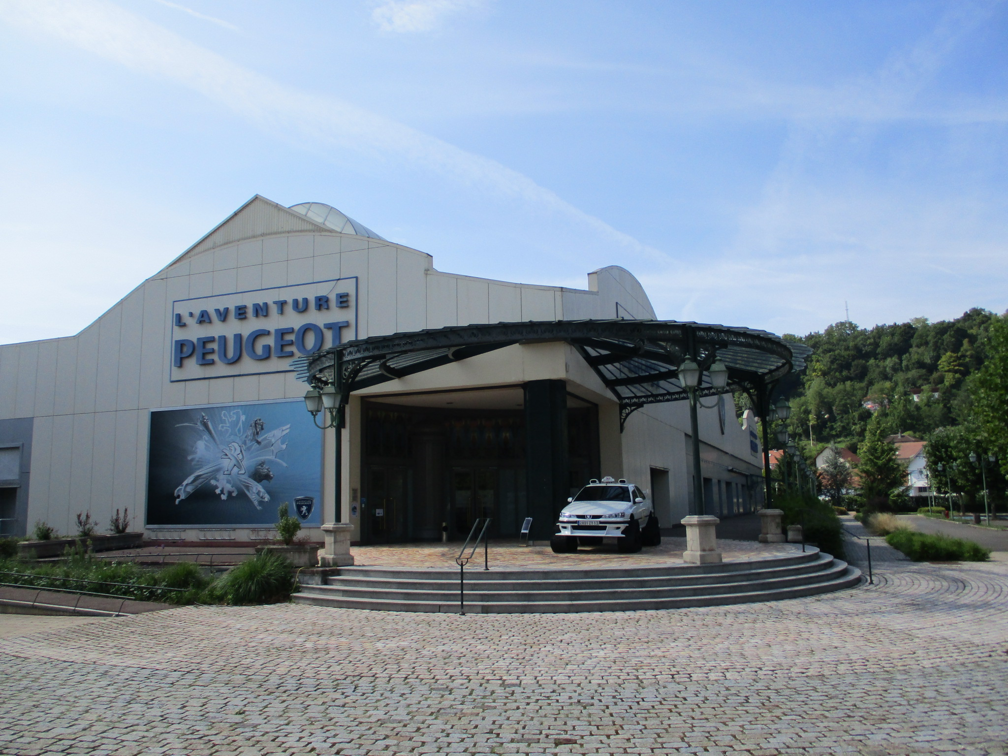 Musée de l'Aventure Peugeot-Sochaux / Peugeot 406 in Taxi 3